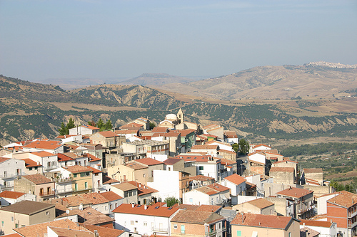 Panorama di Calciano (MT)